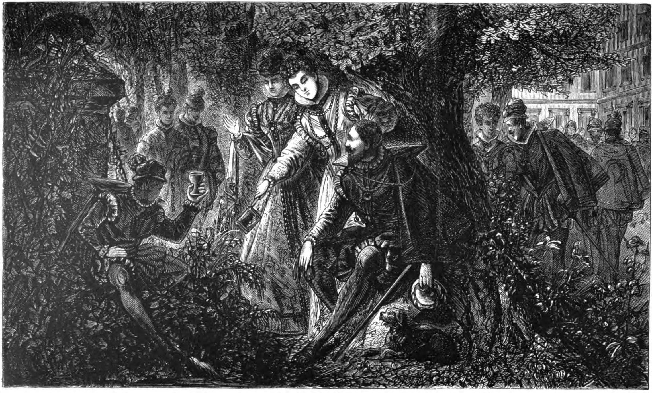 Kaiser Matthias am "Schönen Brunnen".